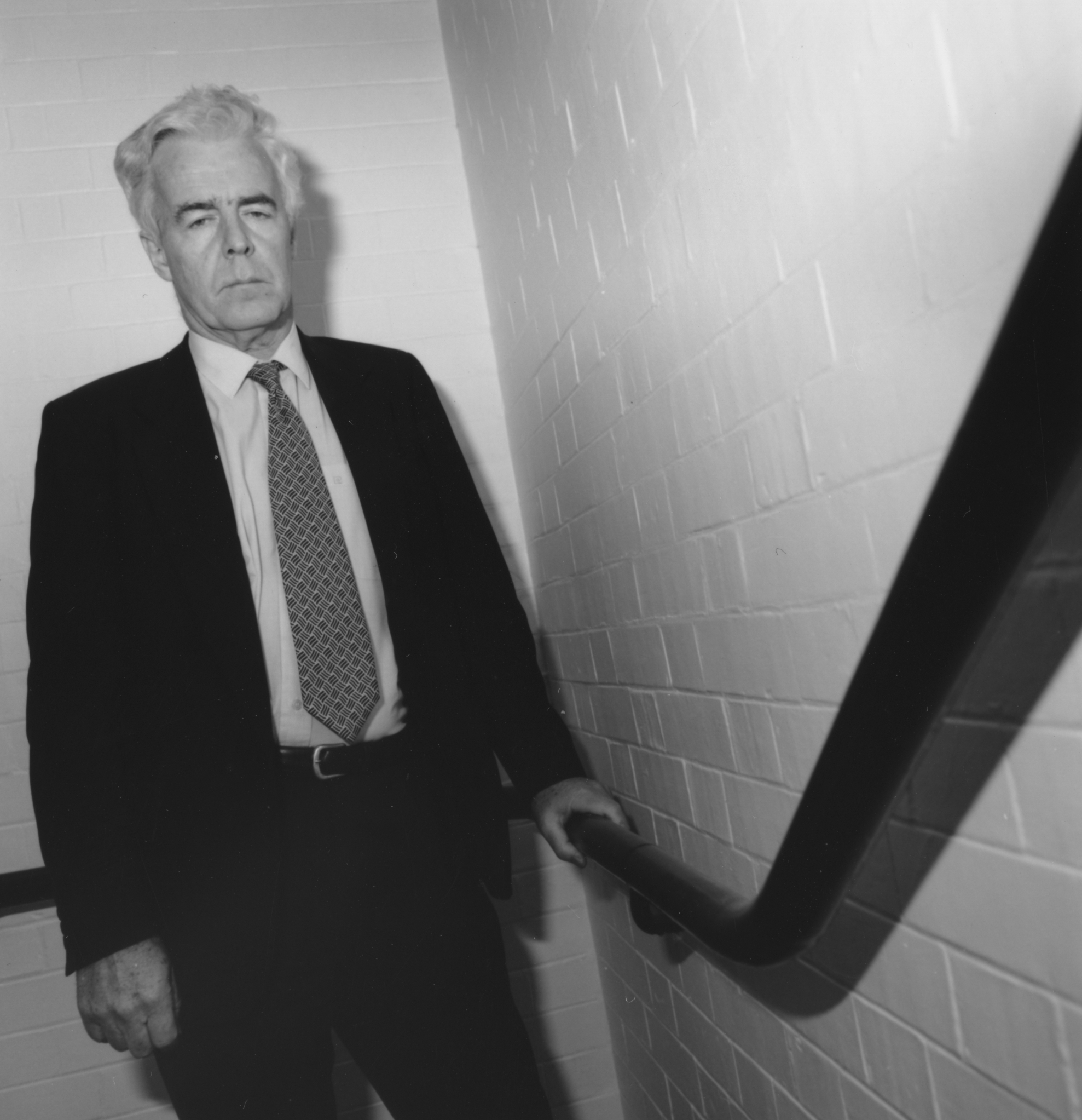 Department of Management IMAGELIBRARY/582 Persistent URL